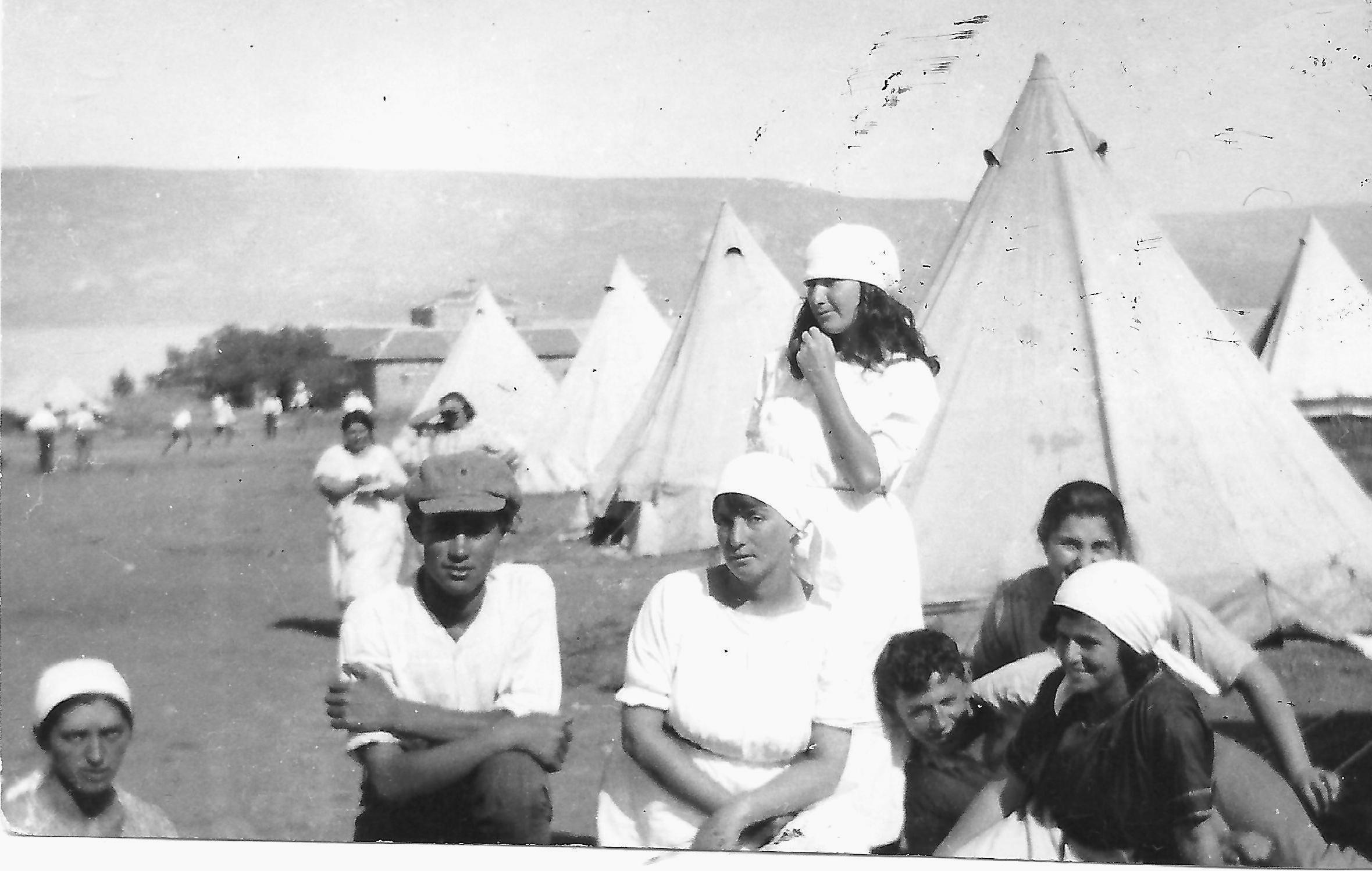 הר כנרת 1920 אוהלי הראשונים צילם יואל ולבה